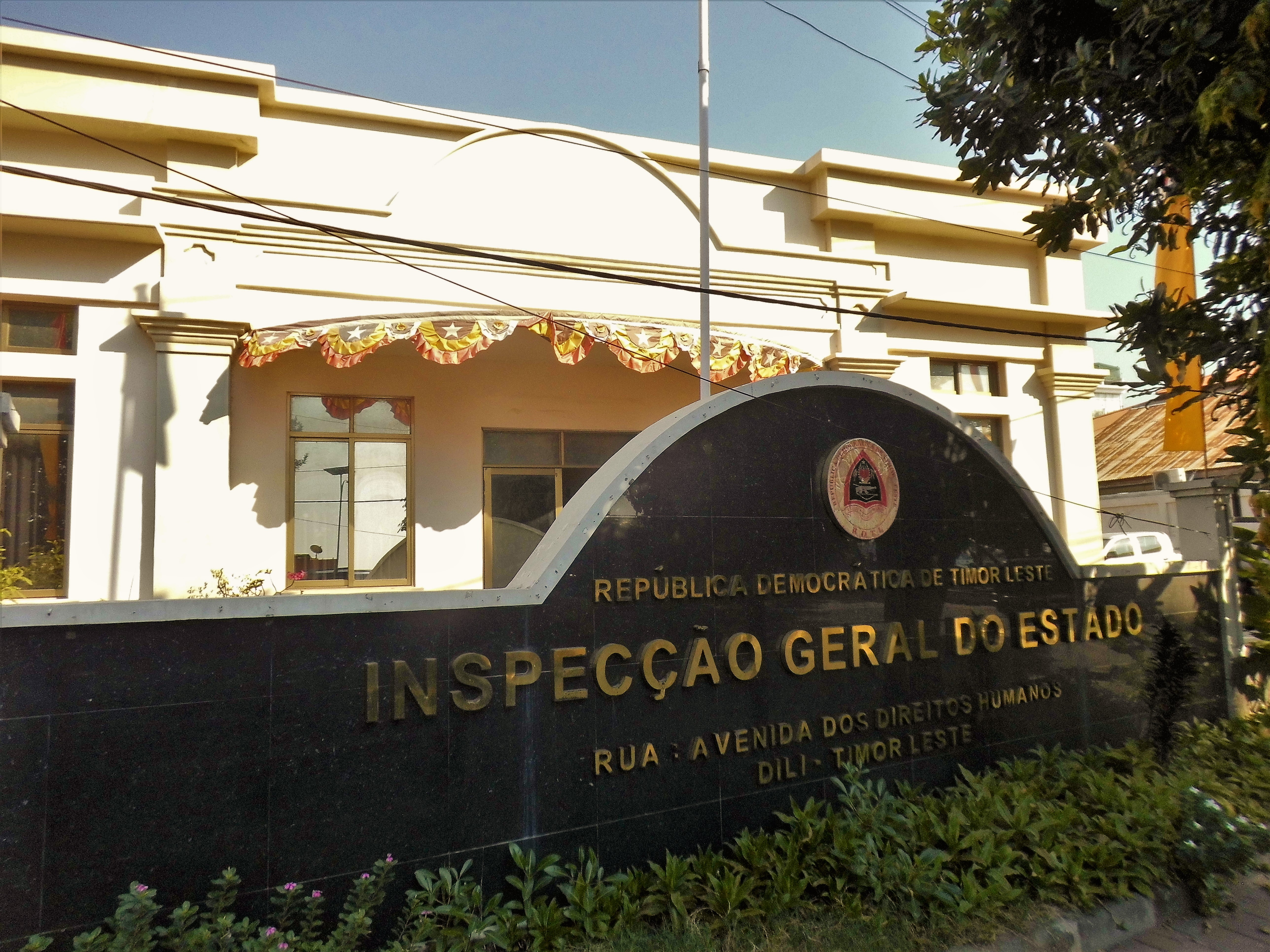 Inspeccao General do Estado